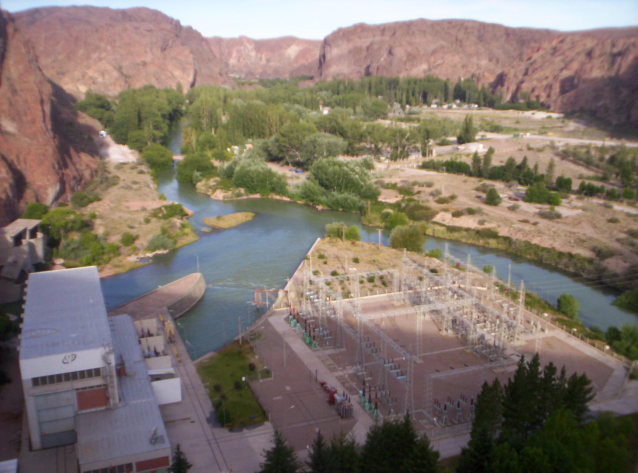 desde la represa la pequeña villa y su verdor